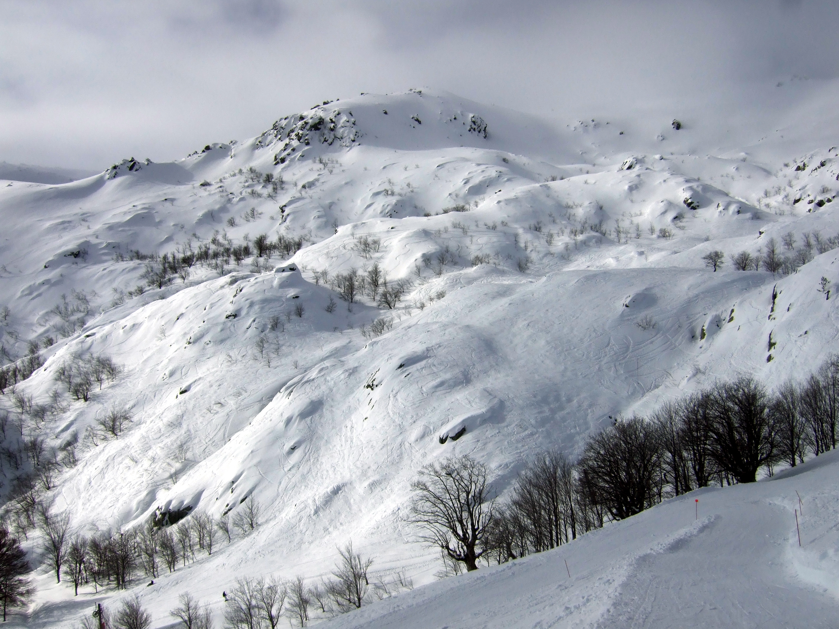 Sur une piste de ski de la station de Ghisoni-Capannelle (Fiumorbo).